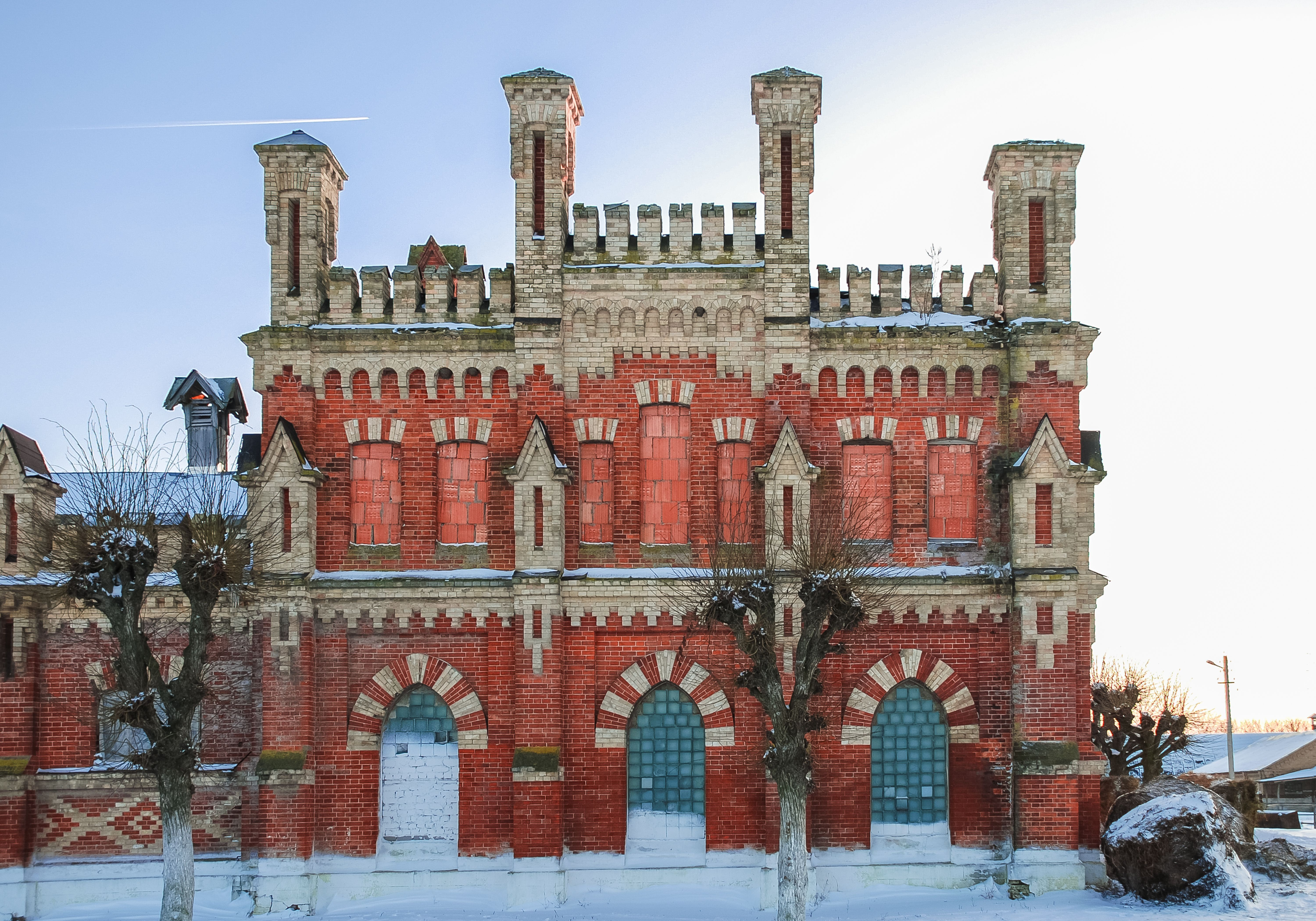 Конный завод: Старожилово, Старожиловский район, Рязанская область